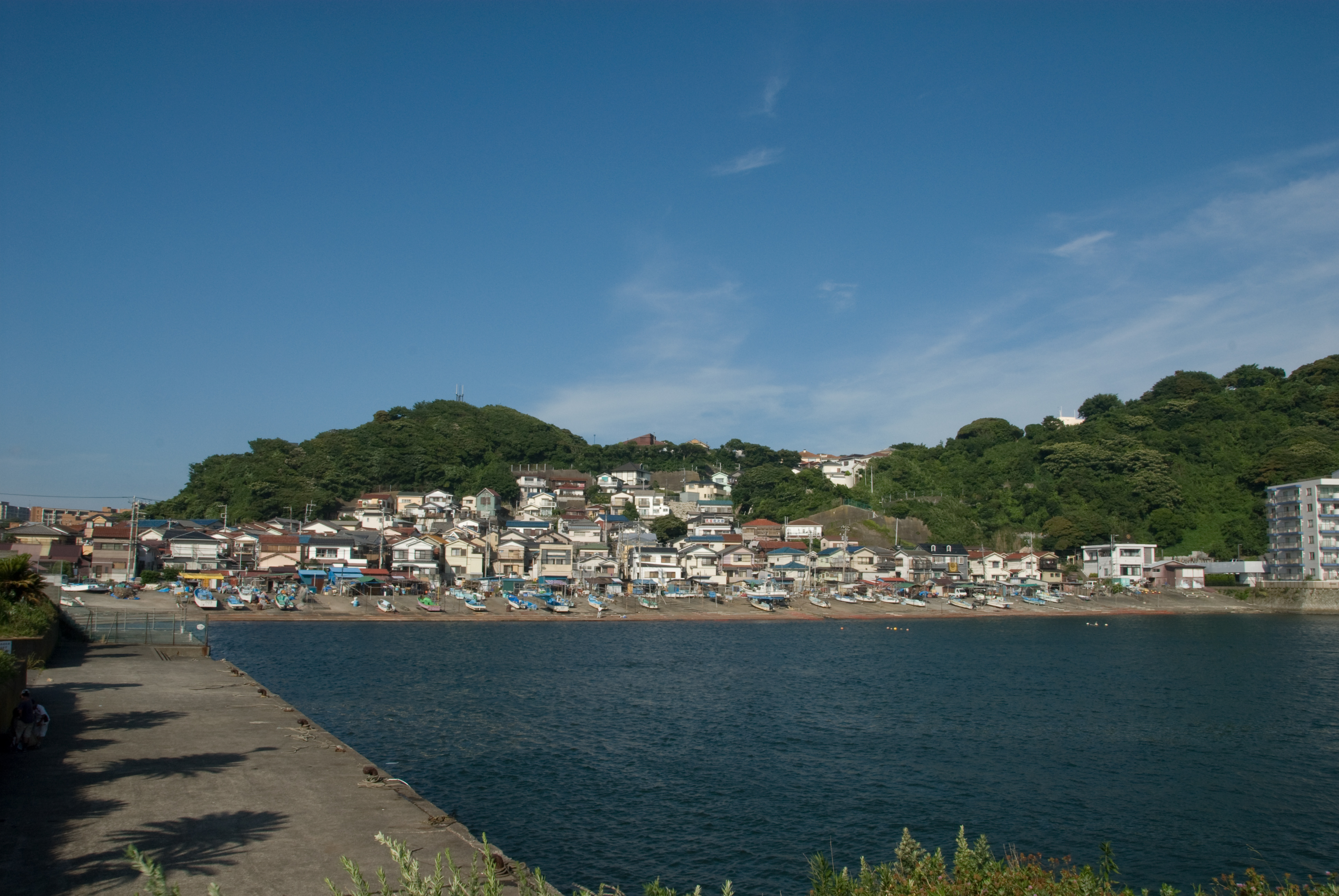 Kotsubo Harbor, Kanagawa Pref. Japan